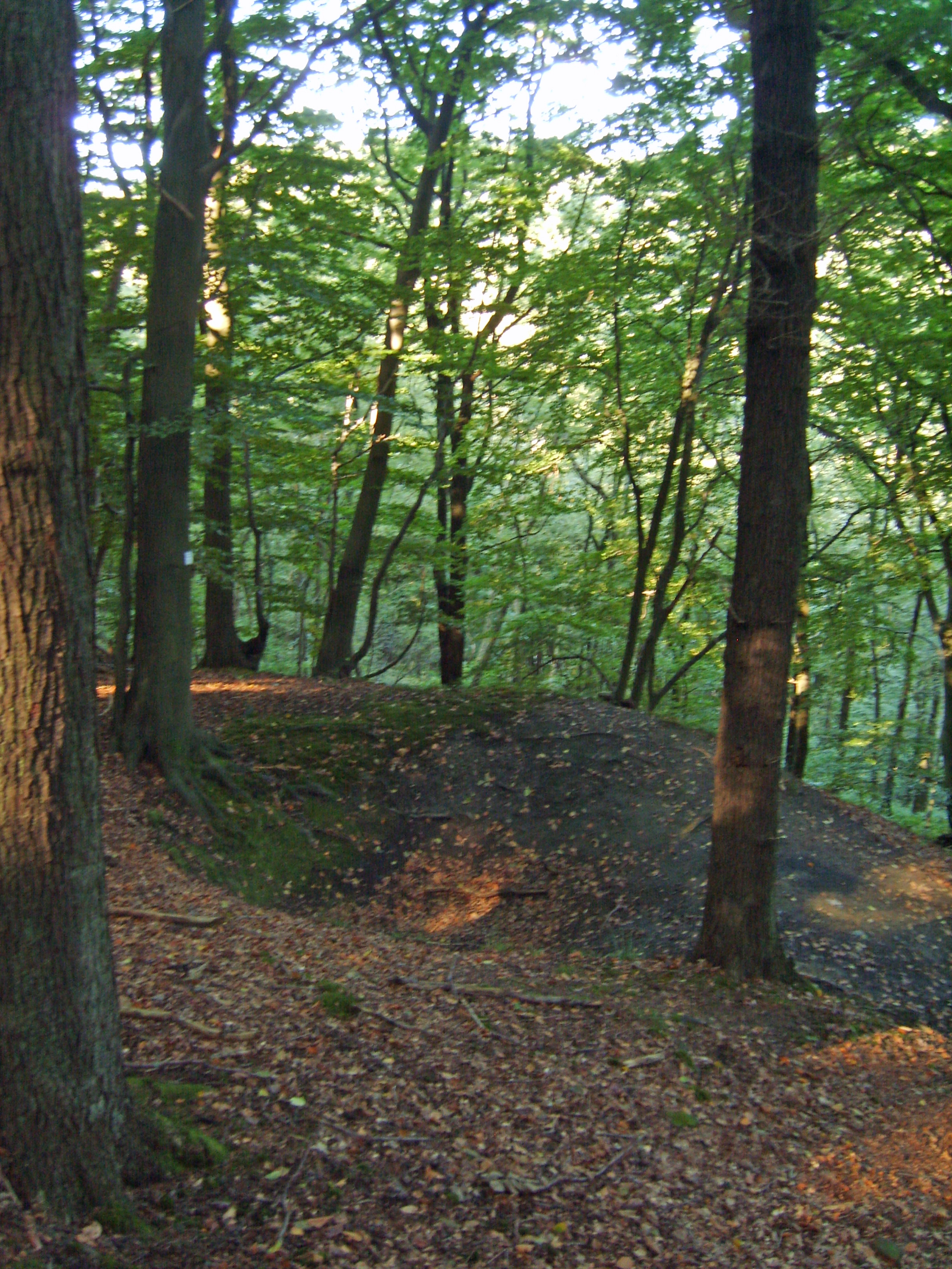 Pinge im Bereich des Bergwerks Graf Wittekind